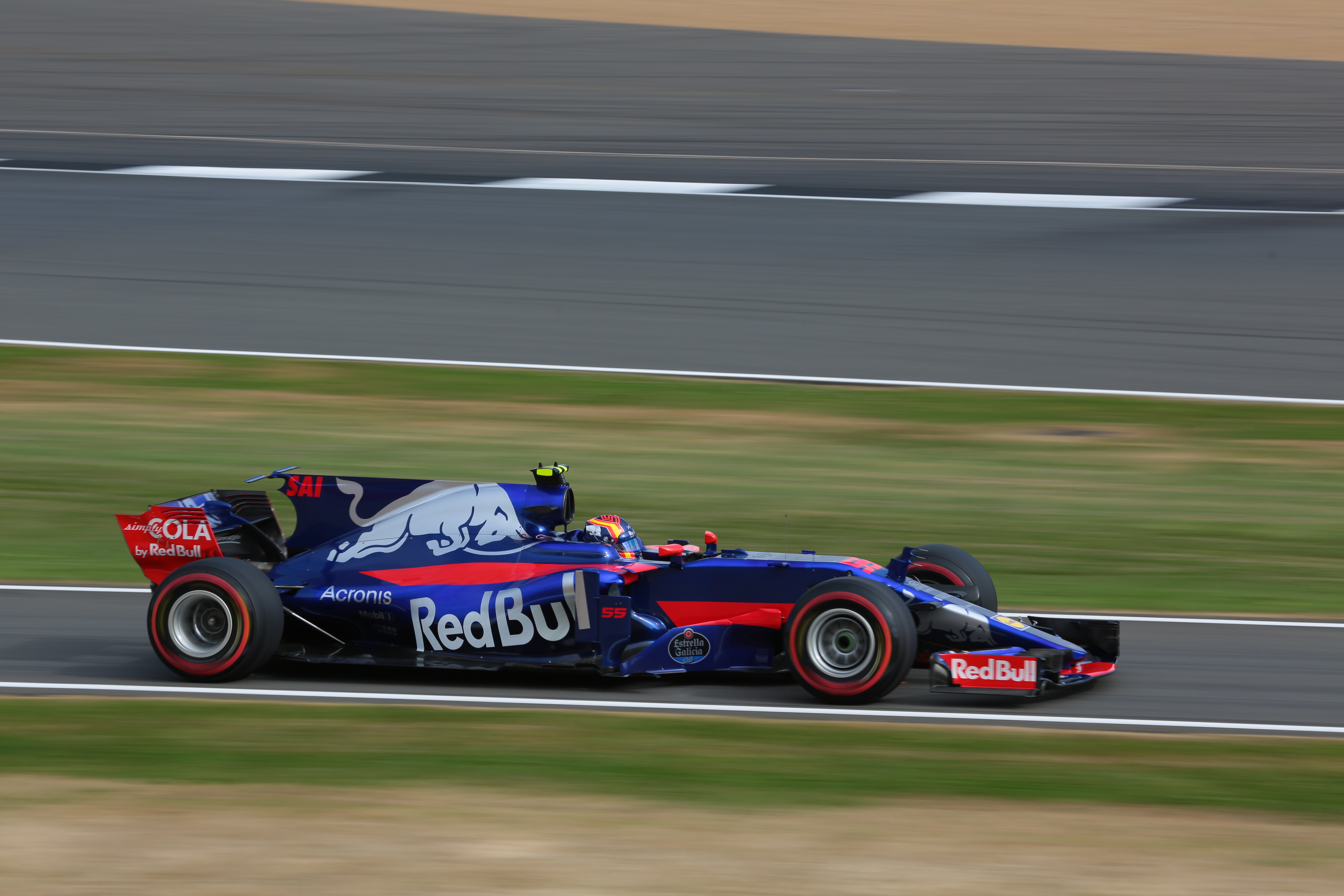 f1